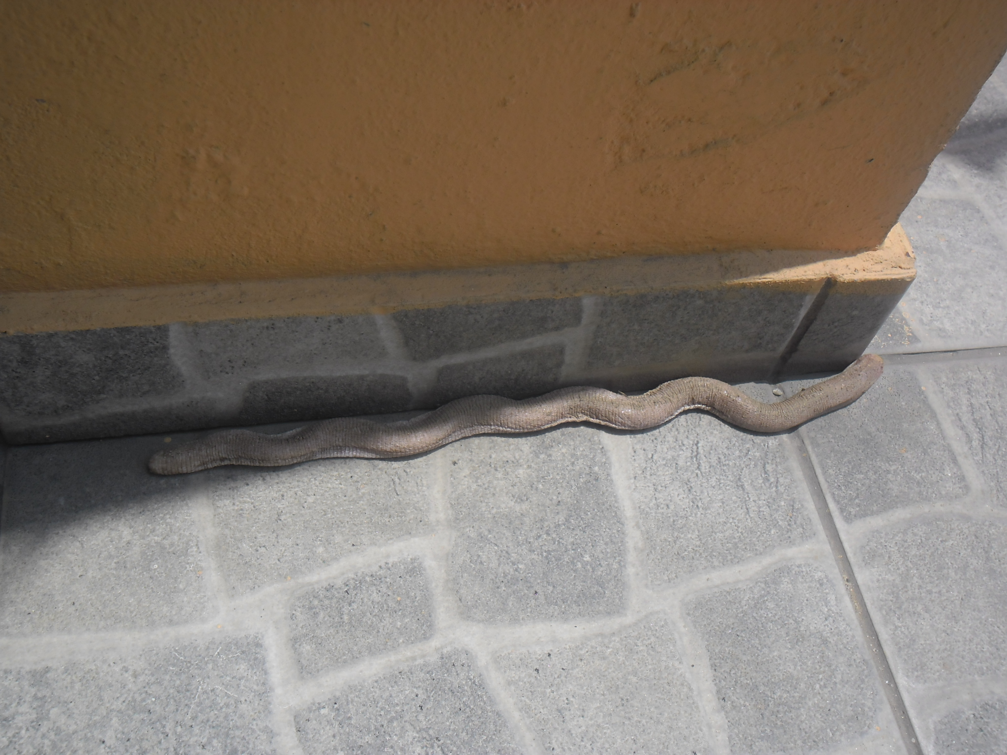 Cobra da terra, espécie não conhecida por mim, encontrada durante retirada de terra do quintal da minha casa. Foi colocada num balde com terra e será levada para Itacoatiara, Niterói, onde será solta na natureza.